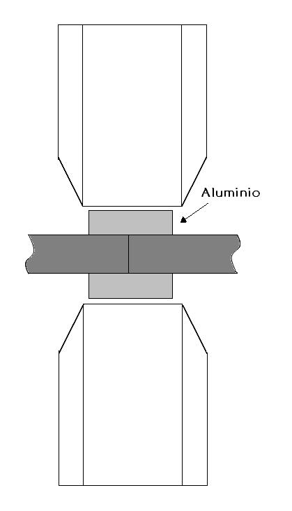 Tipo de soldadura por roldanas o costura